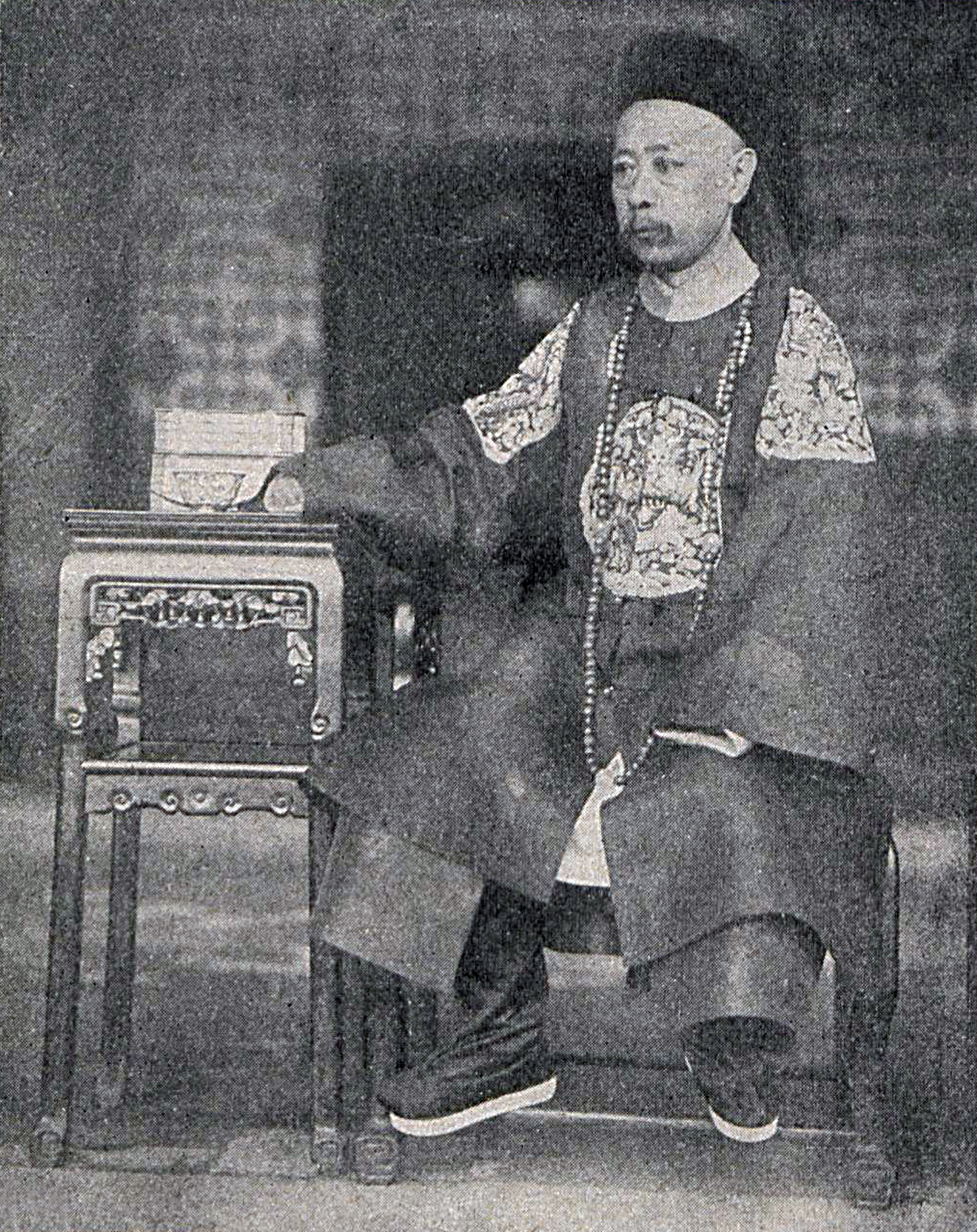 中文（台灣）: 慶密親王奕劻，大清首任內閣總理大臣